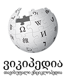 ვიკიპედიის ლოგო 2.0